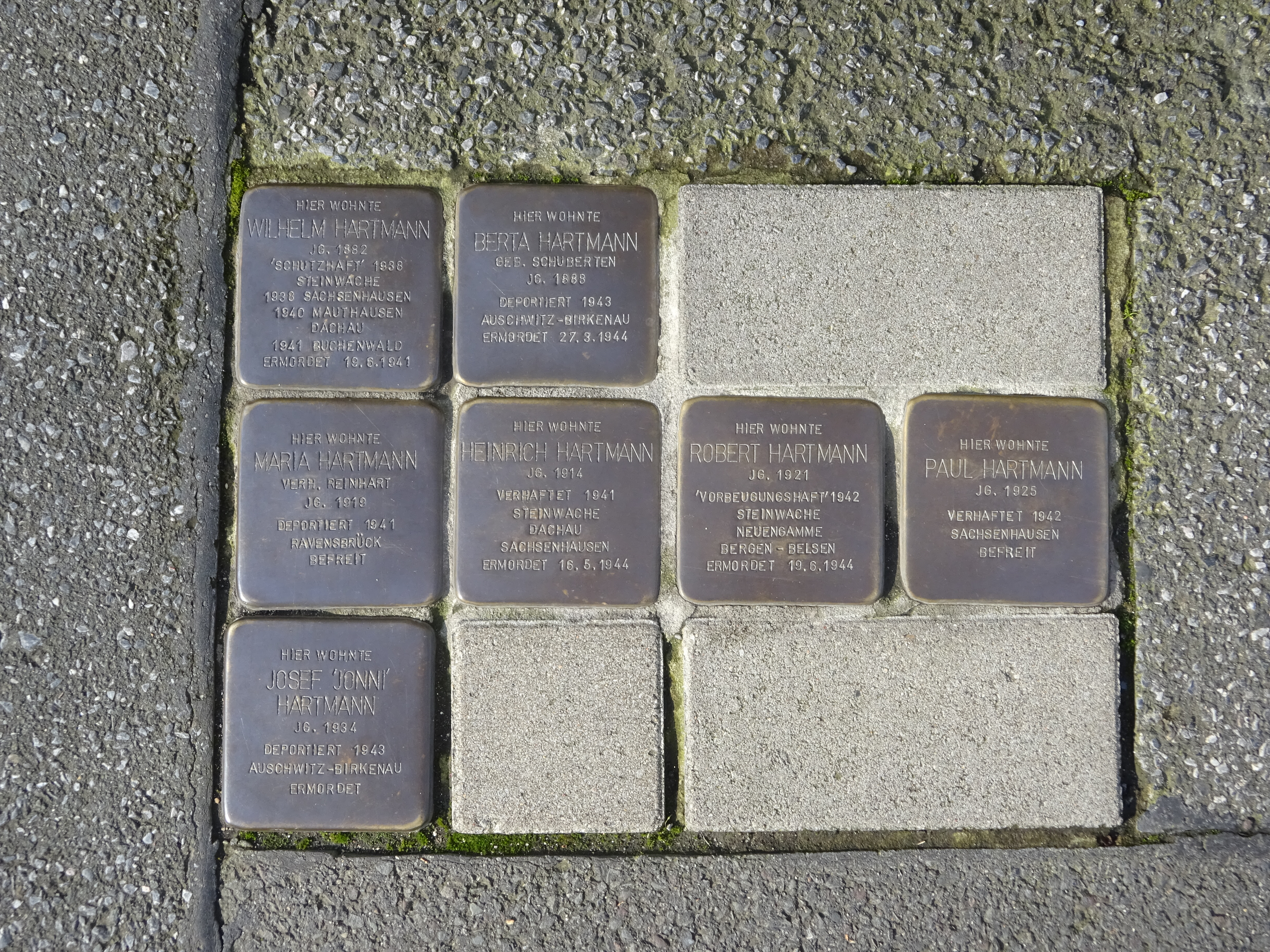 Stolpersteine Burgweg 38 in Dortmund